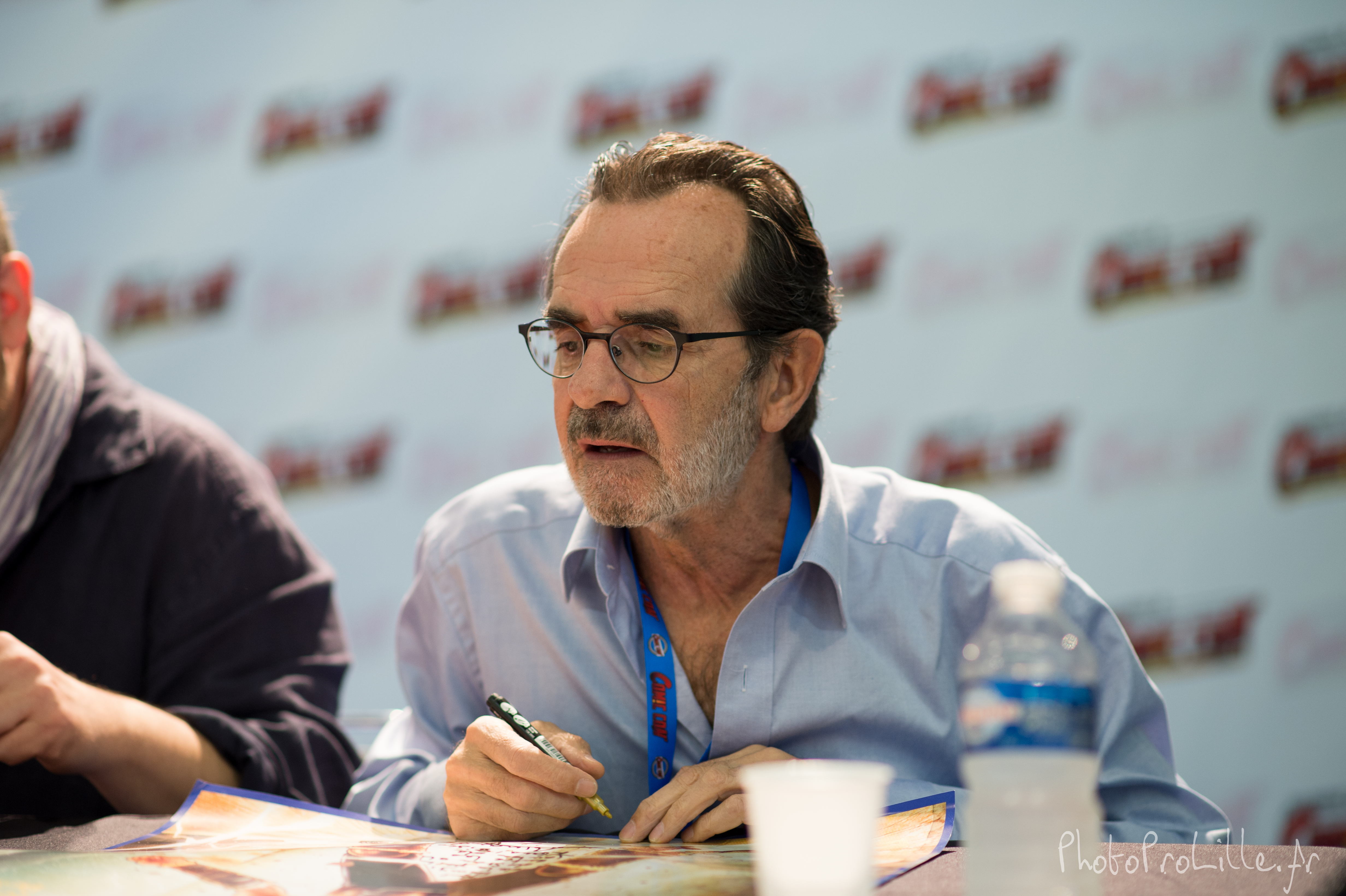 Hubert Saint-Macary au Comic Con #5 - Paris